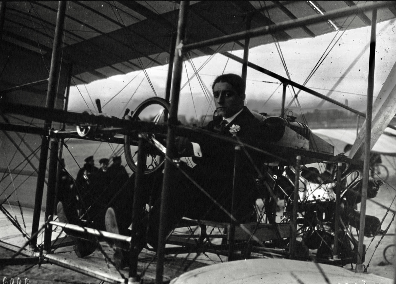 Edmond Poillot, aviateur. Photographie de presse / Agence Meurisse - 1910. Source : / Bibliothèque nationale de France